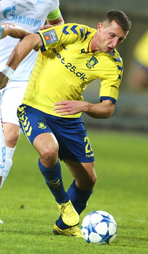 Kamil Wilczek, piłkarz.